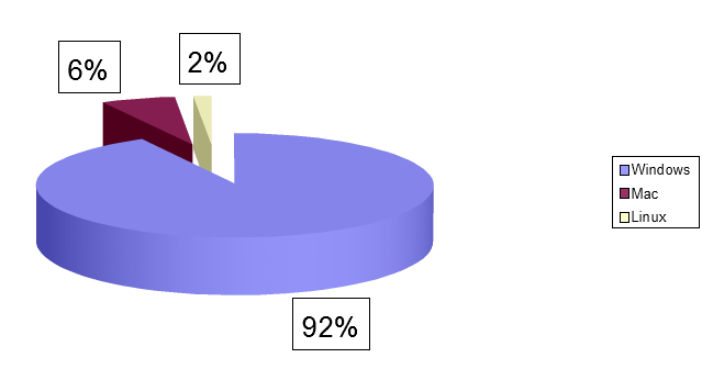 Ranking de sistemas operativos de escritorio a enero 2012. Varias fuentes.